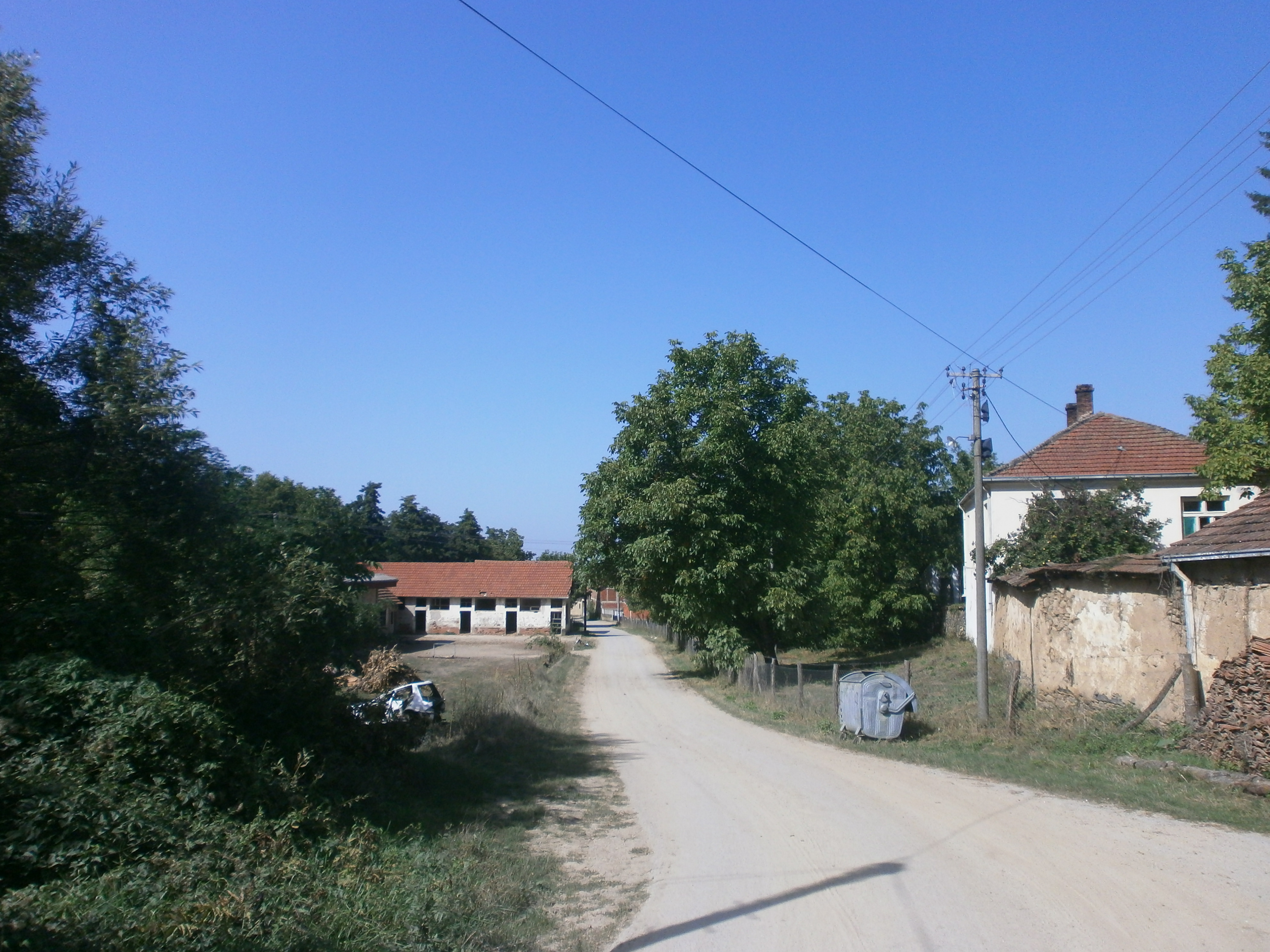 Srpski (latinica): Čukljenik, Leskovac